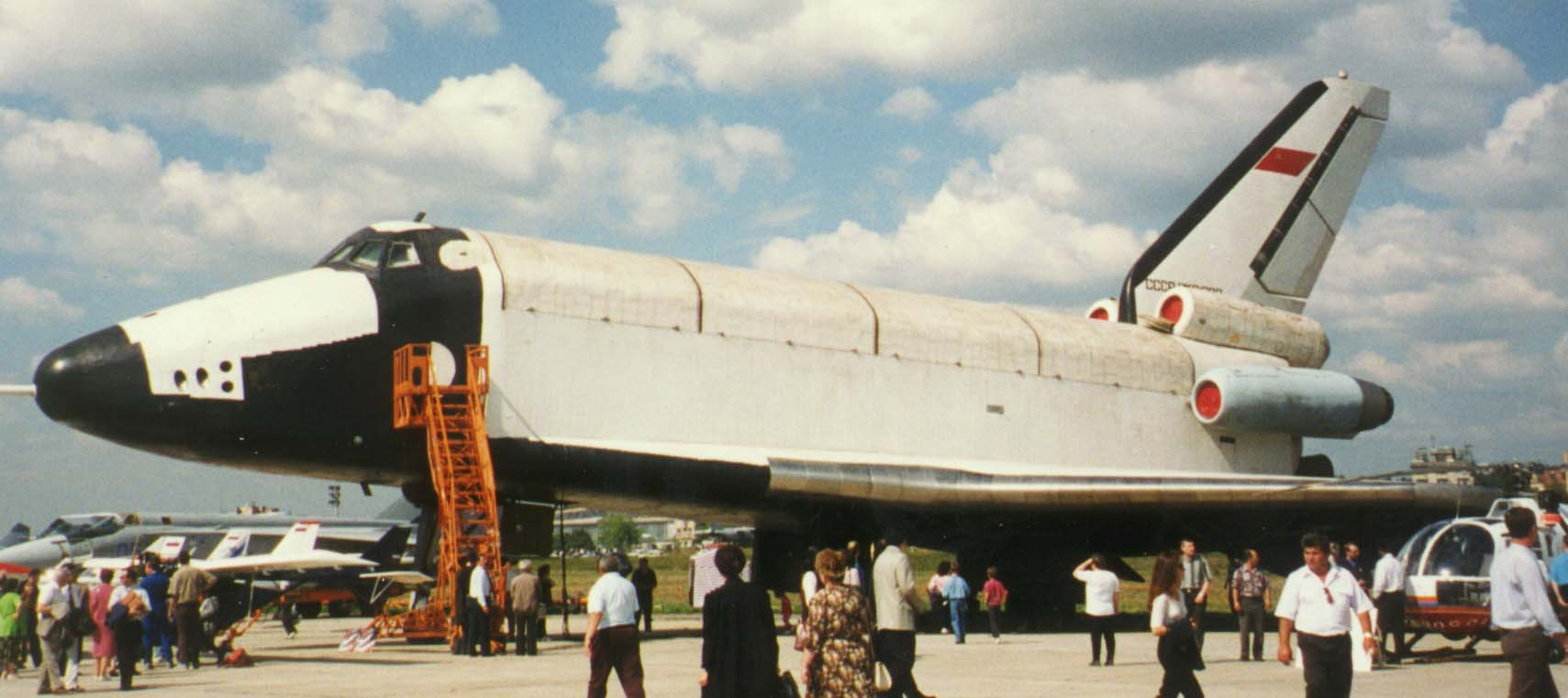 BTS-002 Atmospährentest &Trainingsflugzeug für das Buran Space Shuttle Programm